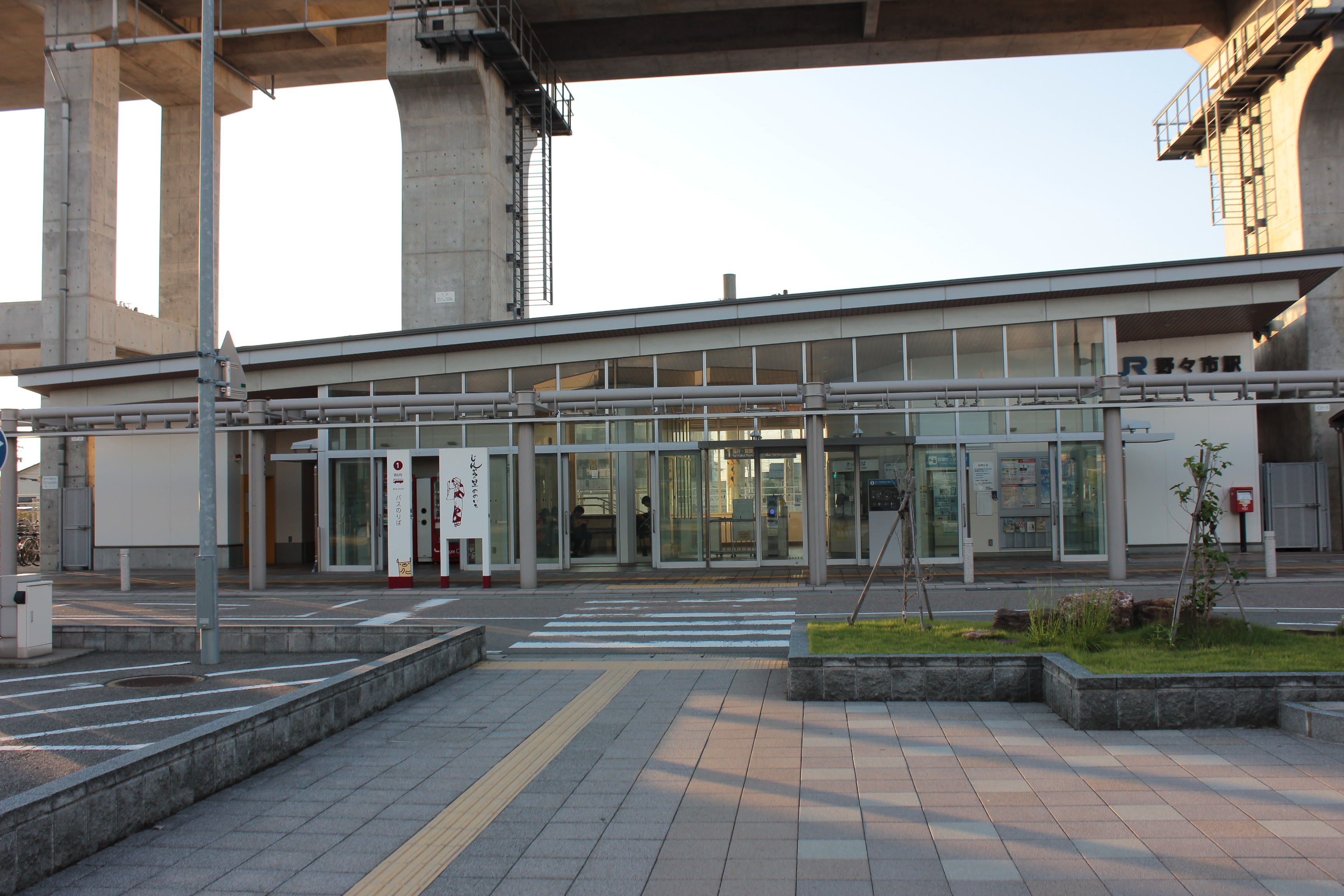 野々市駅南口（石川県野々市市） Canon EOS Kiss X5